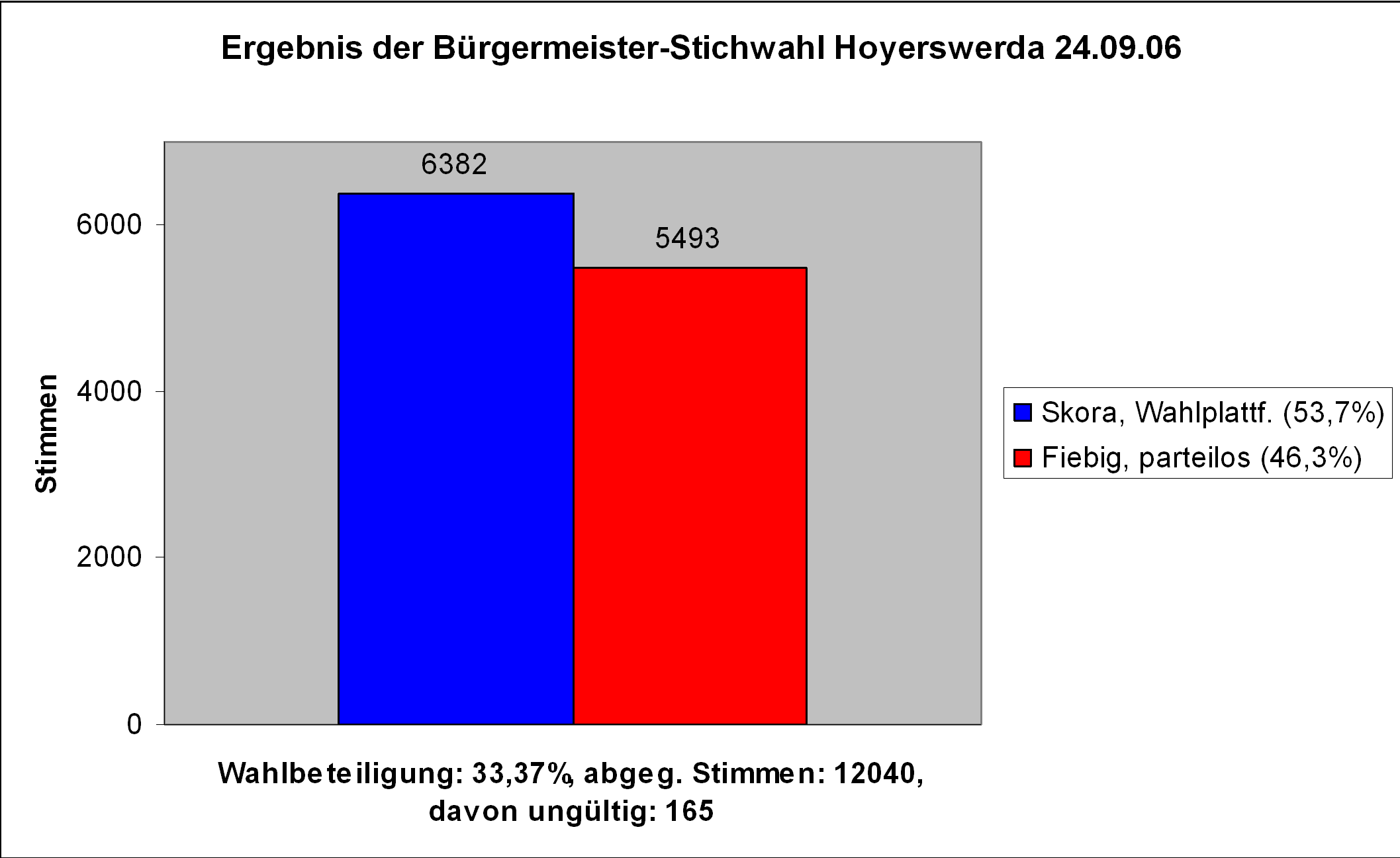 Wahlergebnis der Bürgermeister-Stichwahl 2006 in Hoyerswerda